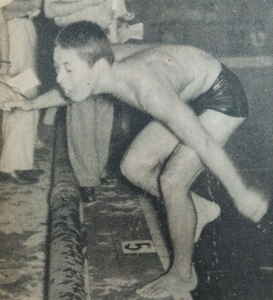 世界新記録樹立直後の古橋廣之進（第27回全日本選手権にて）